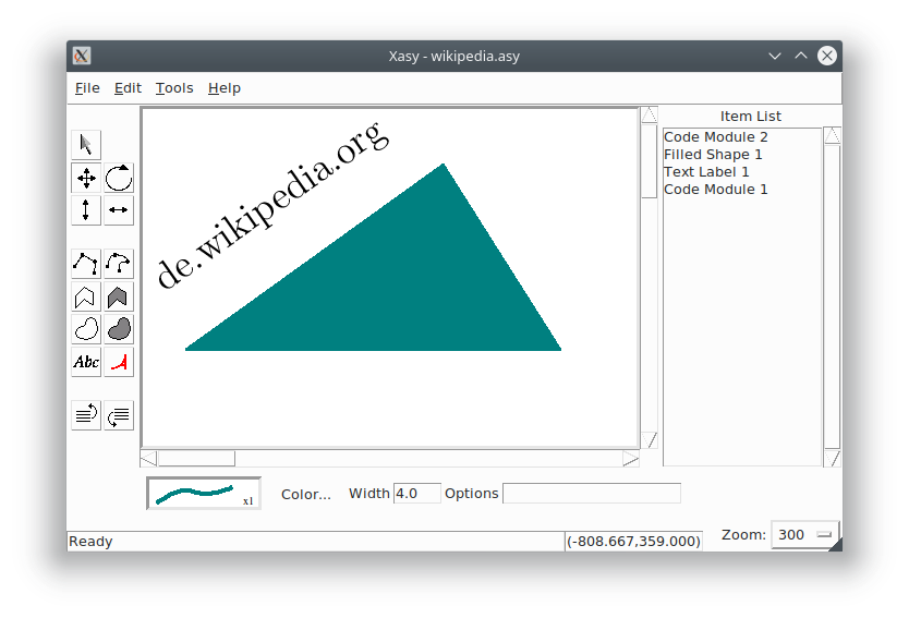 GUI-Anwendung zur Erzeugung von Asymptote-Code. Hier ein gefülltes Polygon und ein Textlabel.